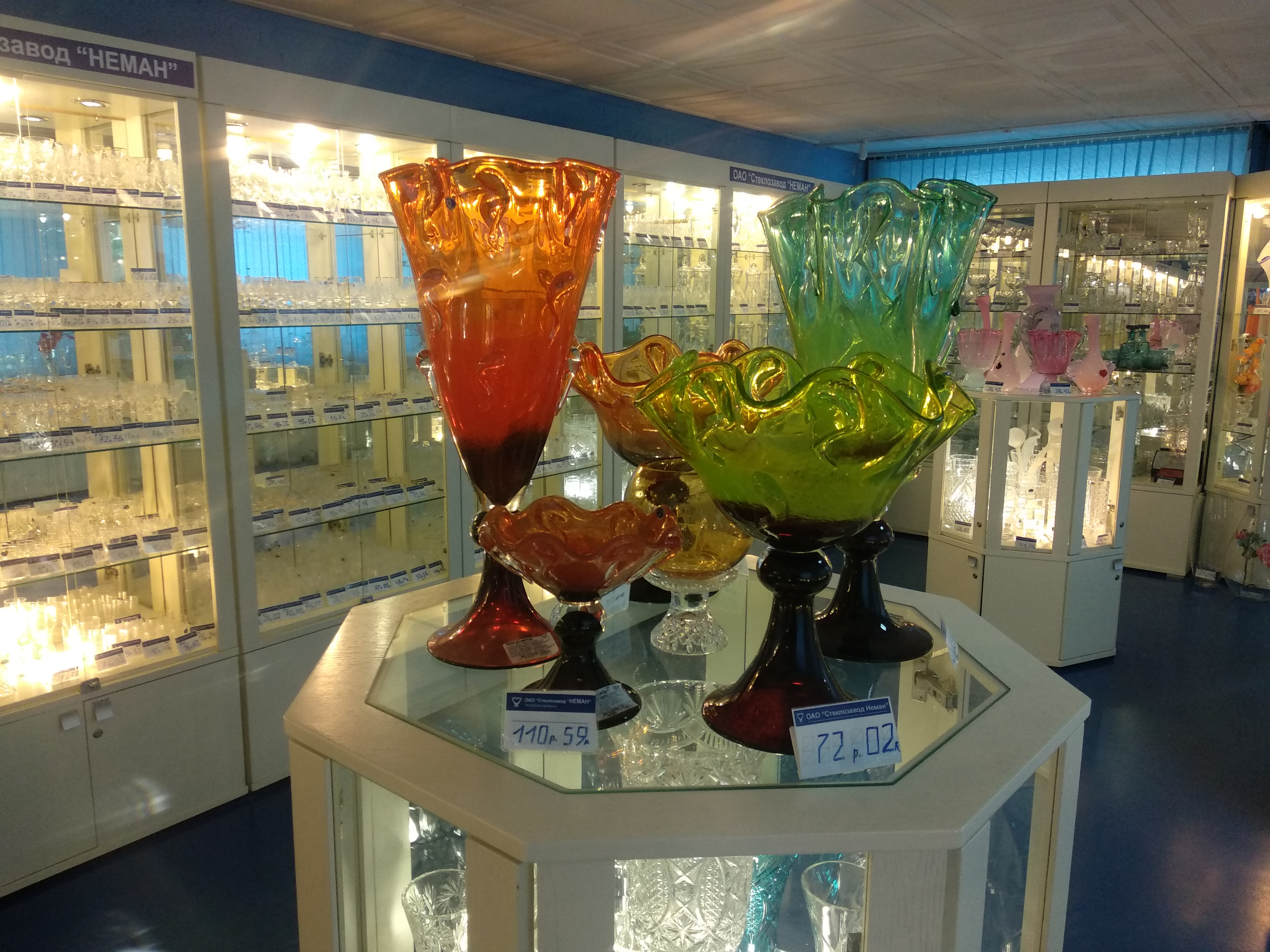 Glass shop in Biarozauka, Belarus